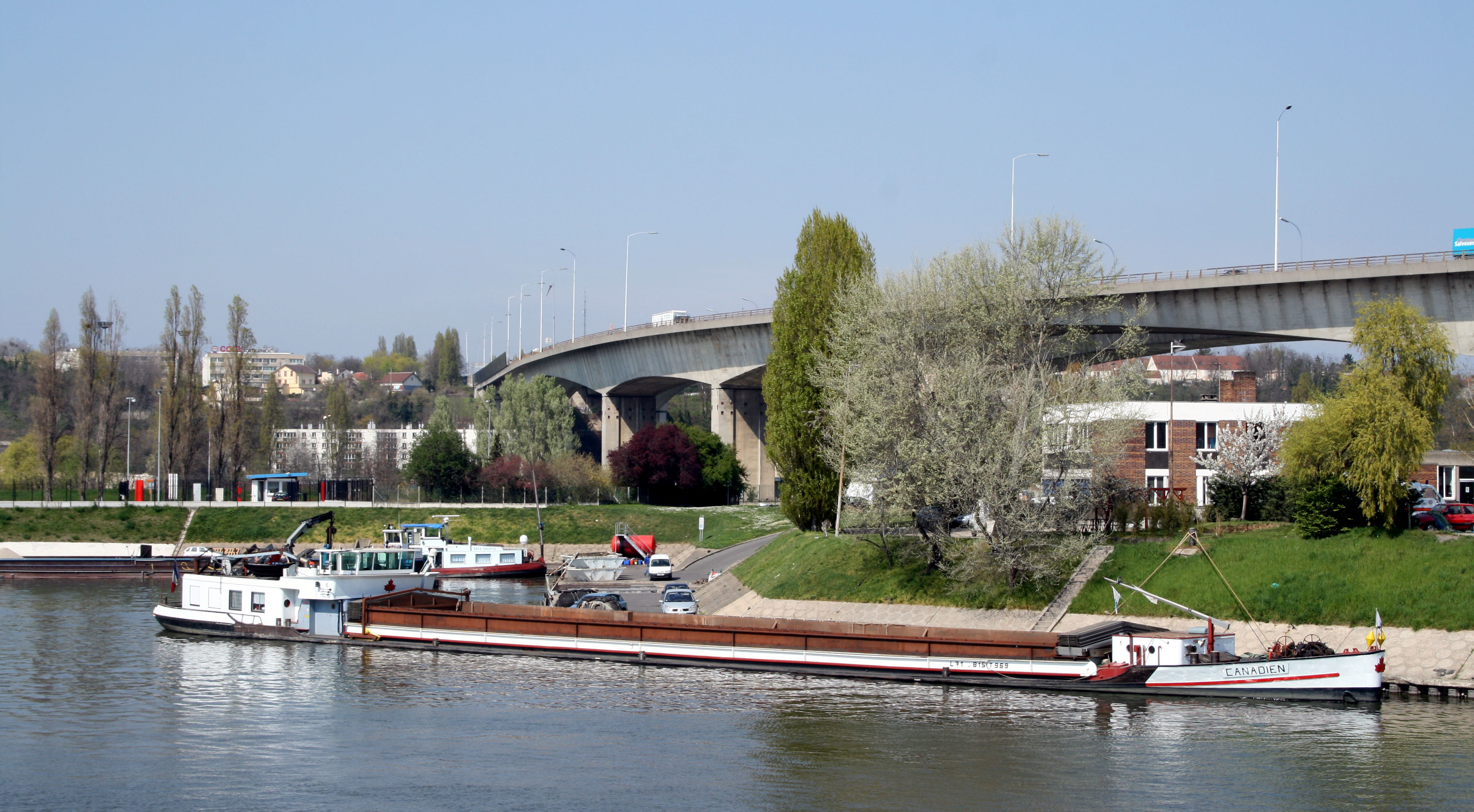 Port de Gennevilliers & Pont d'Argenteuil